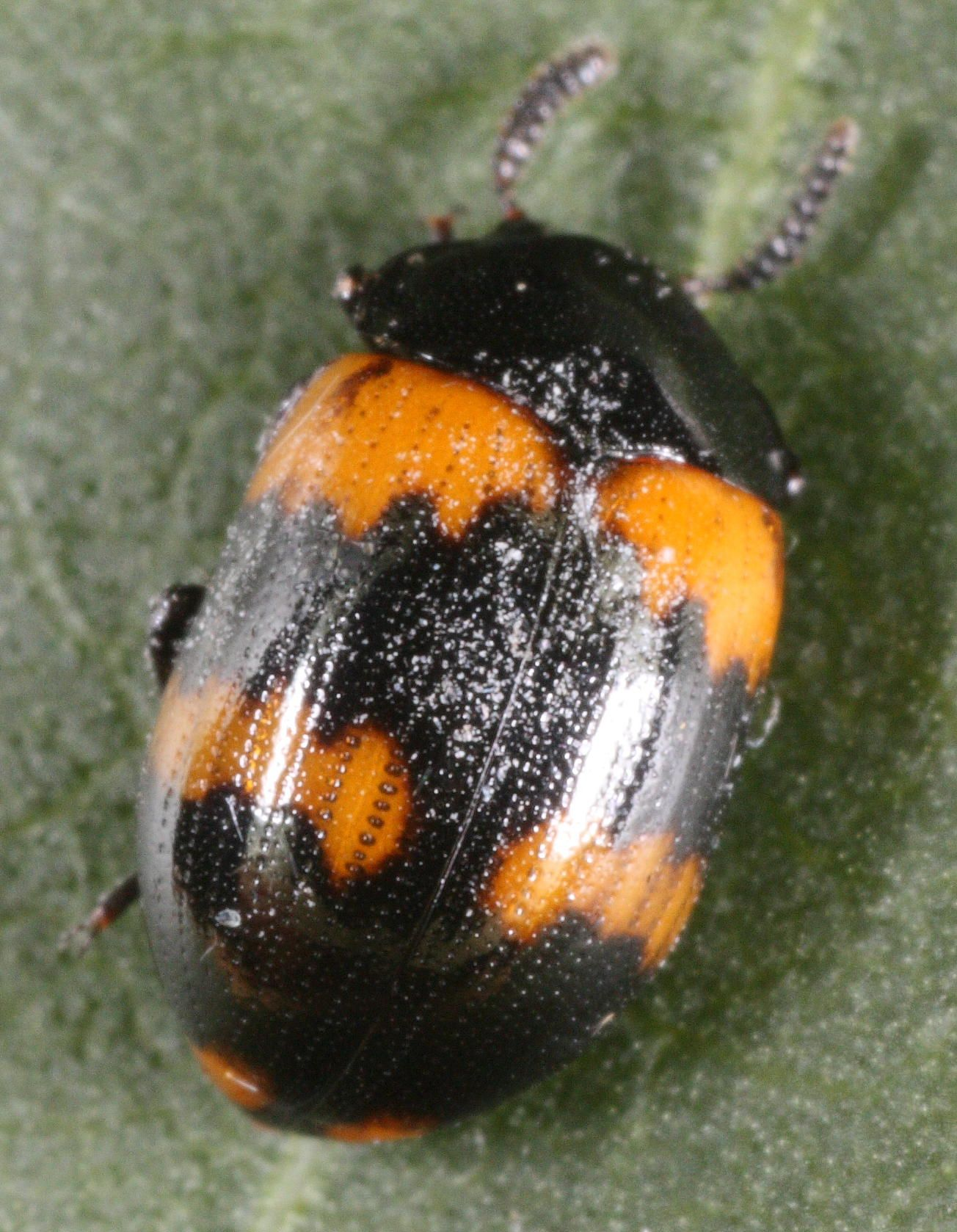 Boreskyggebilla Diaperis boleti lever av sopp, gjerne kjuker